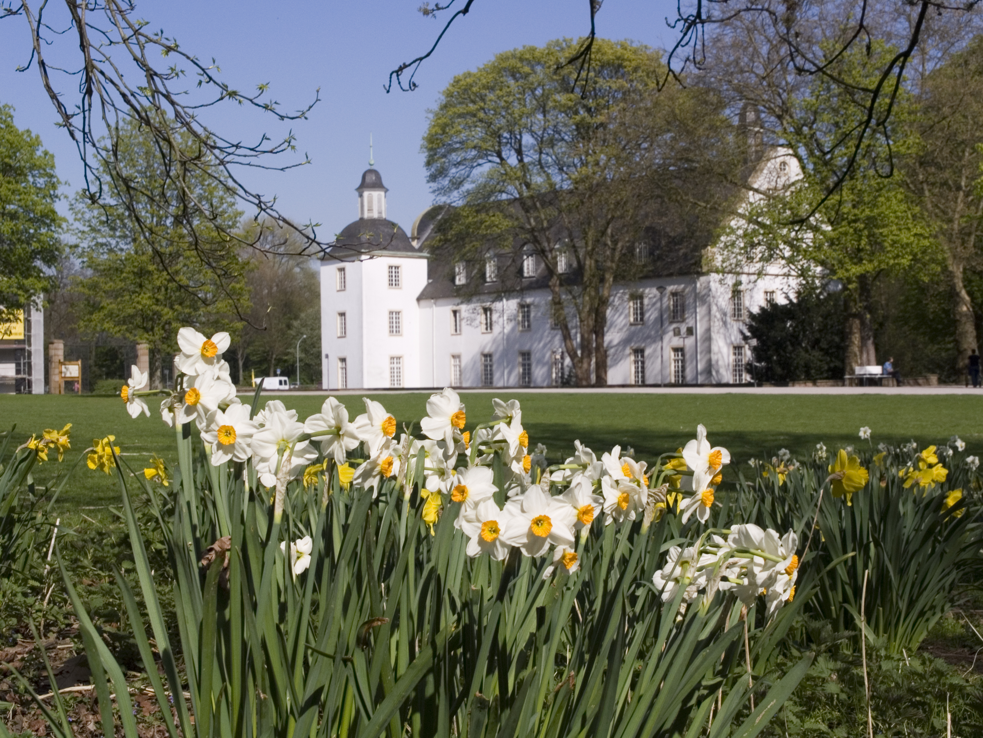 Северный Рейн - Вестфалия, Эссен - замок Борбек